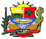 Escudo del municipio Dabajuro, estado Falcón, Venezuela